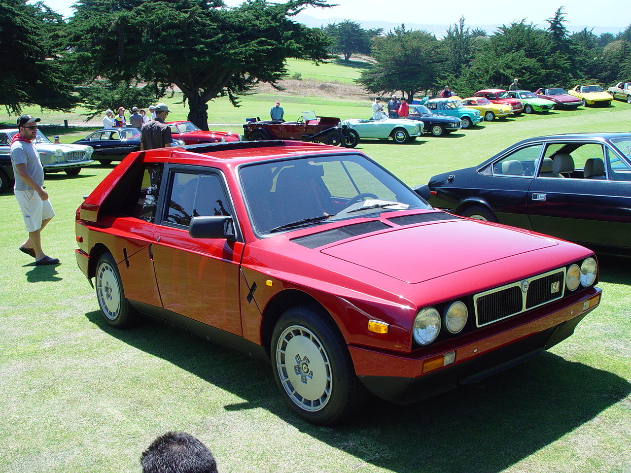 Dsc09588 1985 Lancia Delta S4 Stradale at 2003 Concorso Italiano, Seaside, CA.